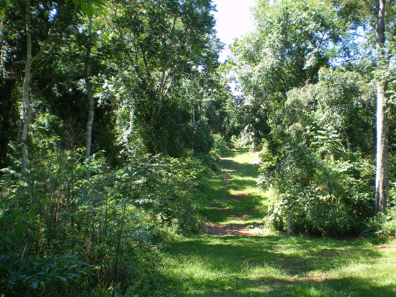 Fotos de los refugios y reservas de Itaipu, tomadas en los años 2007 y 2008 por mí Refugio carapá